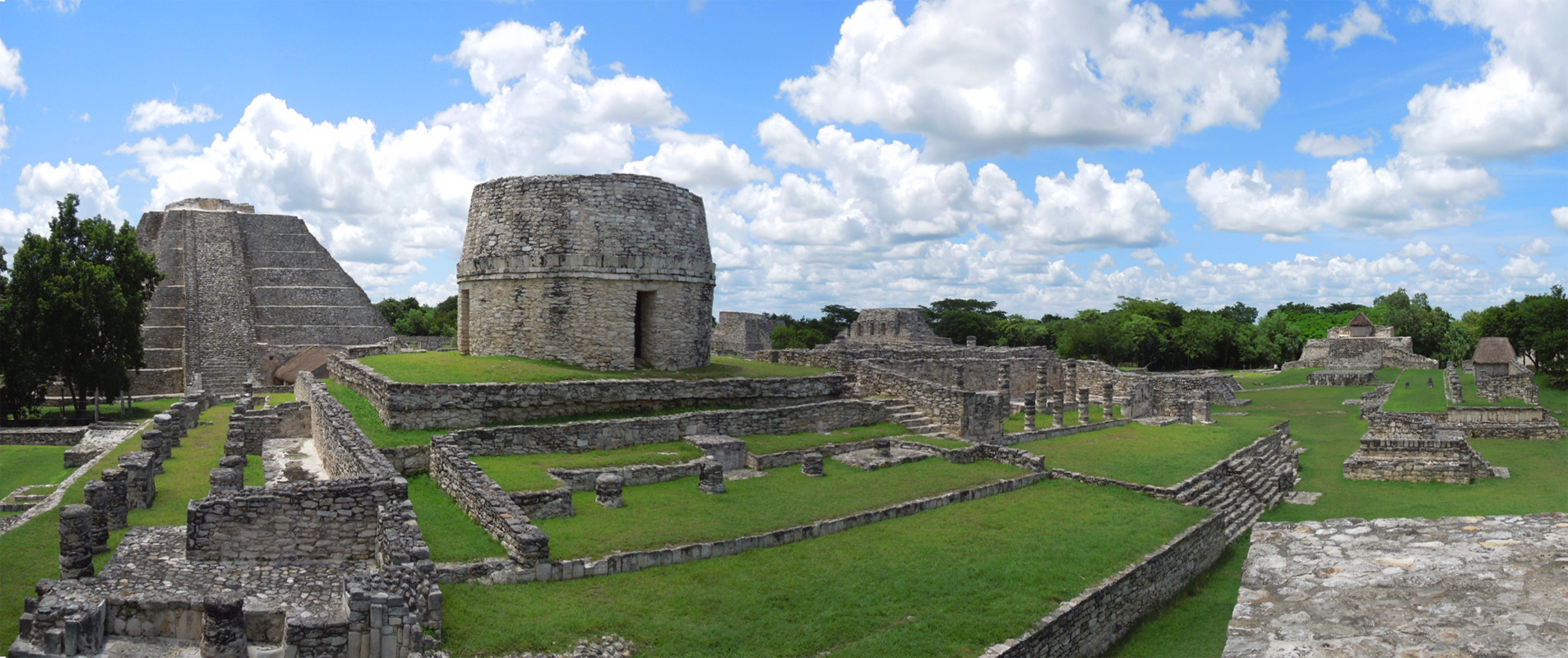 Mayapan